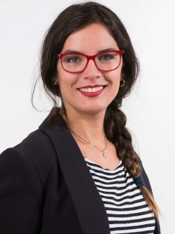 Camila Vallejo Dowling en la fotografía oficial de diputados periodo 2018-2022. (Fotos: Christel Andler, René Lescornez, Johanna Zárate)